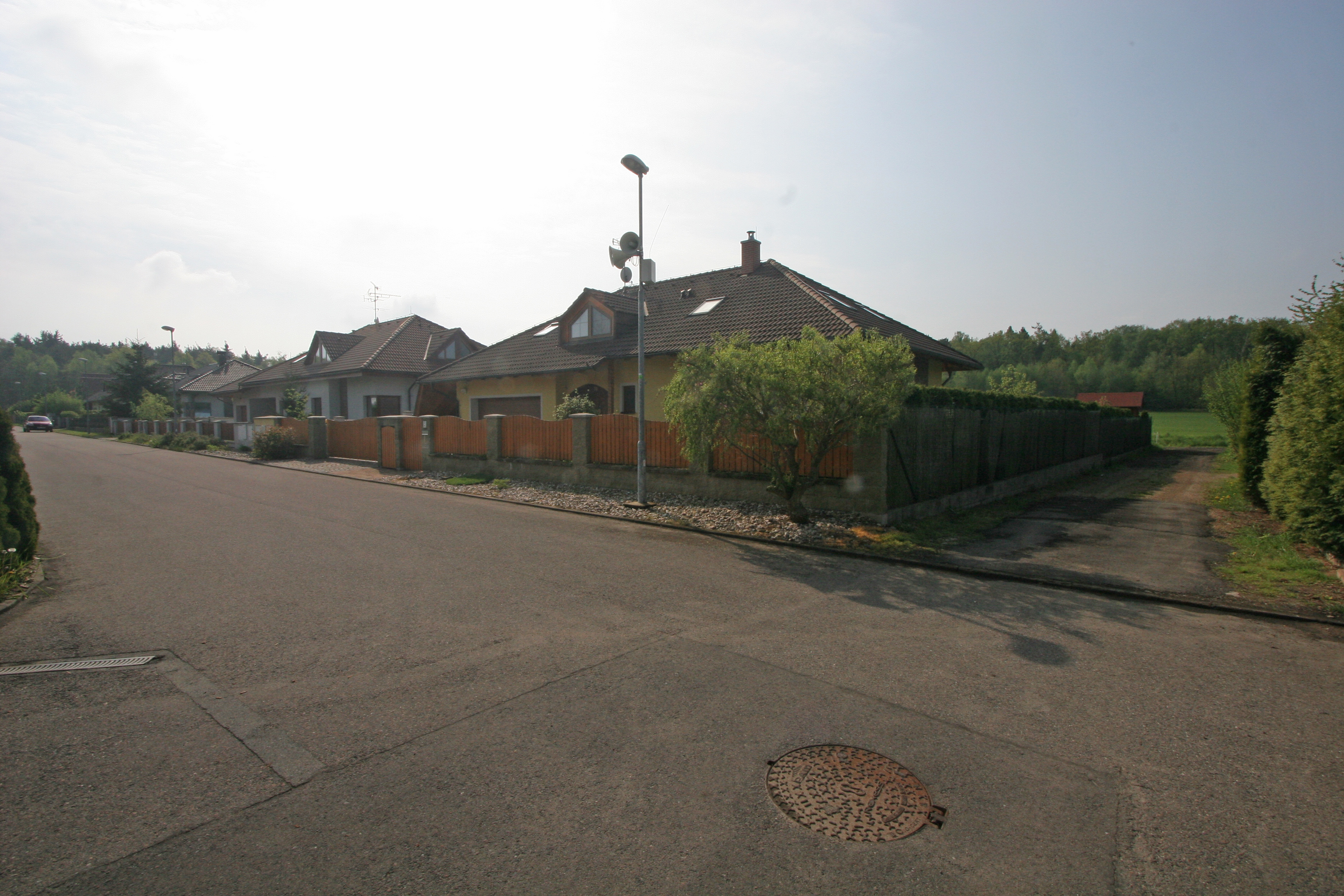 Staročernsko čp. 38